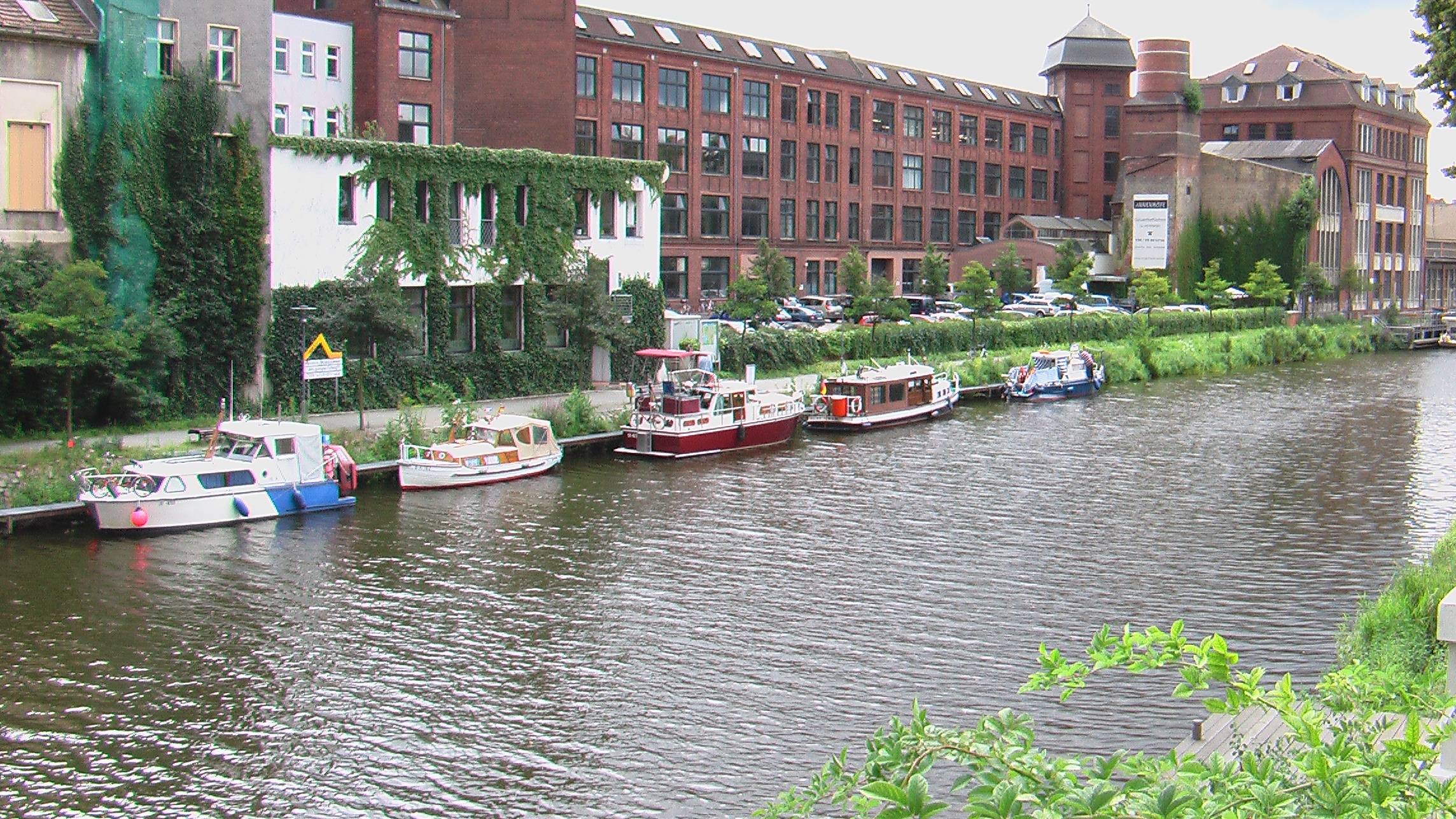 Blick auf Havel in Brandenburg